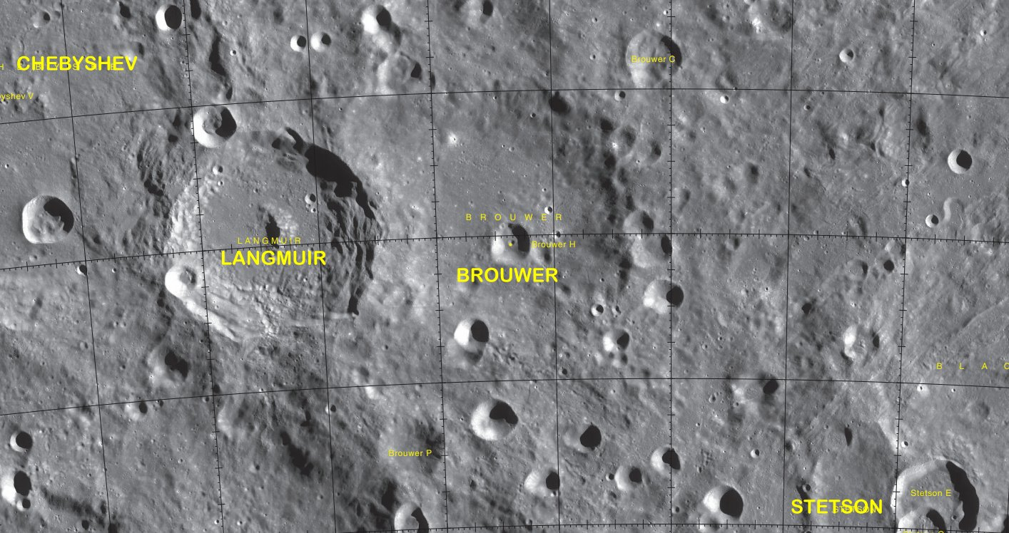 Cráter Chebyshev (LRO)